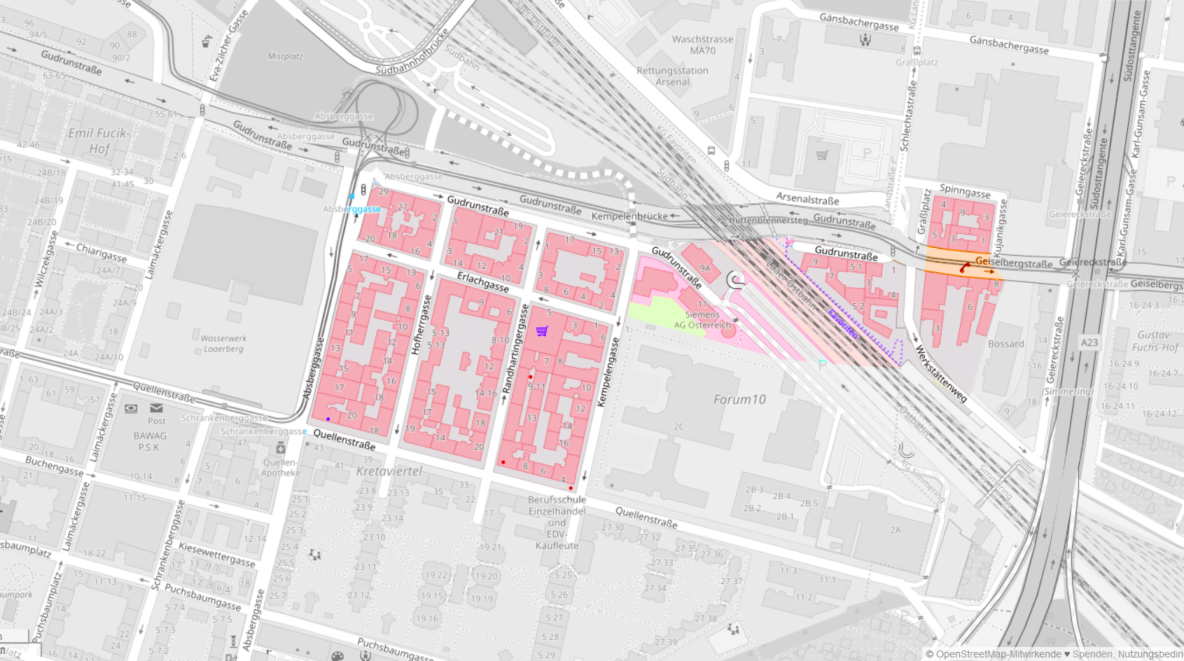 Karte des Kreta-Viertels in Wien 10